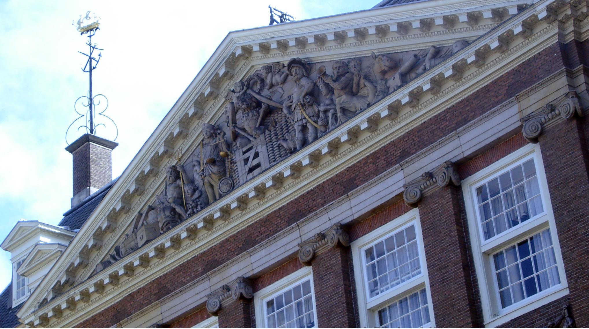 Prinsenhof of Zeekantoor